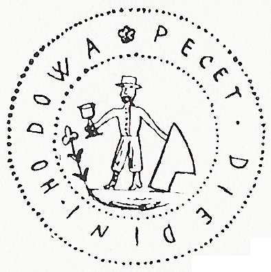 Stará hodovská pečeť s nápisem PECET DIEDINI HODOWA se znakem rolníka držícího kalich a opírajícího se o radlici. Nová pečeť "Obecní úřad Hodova" měla týž znak.